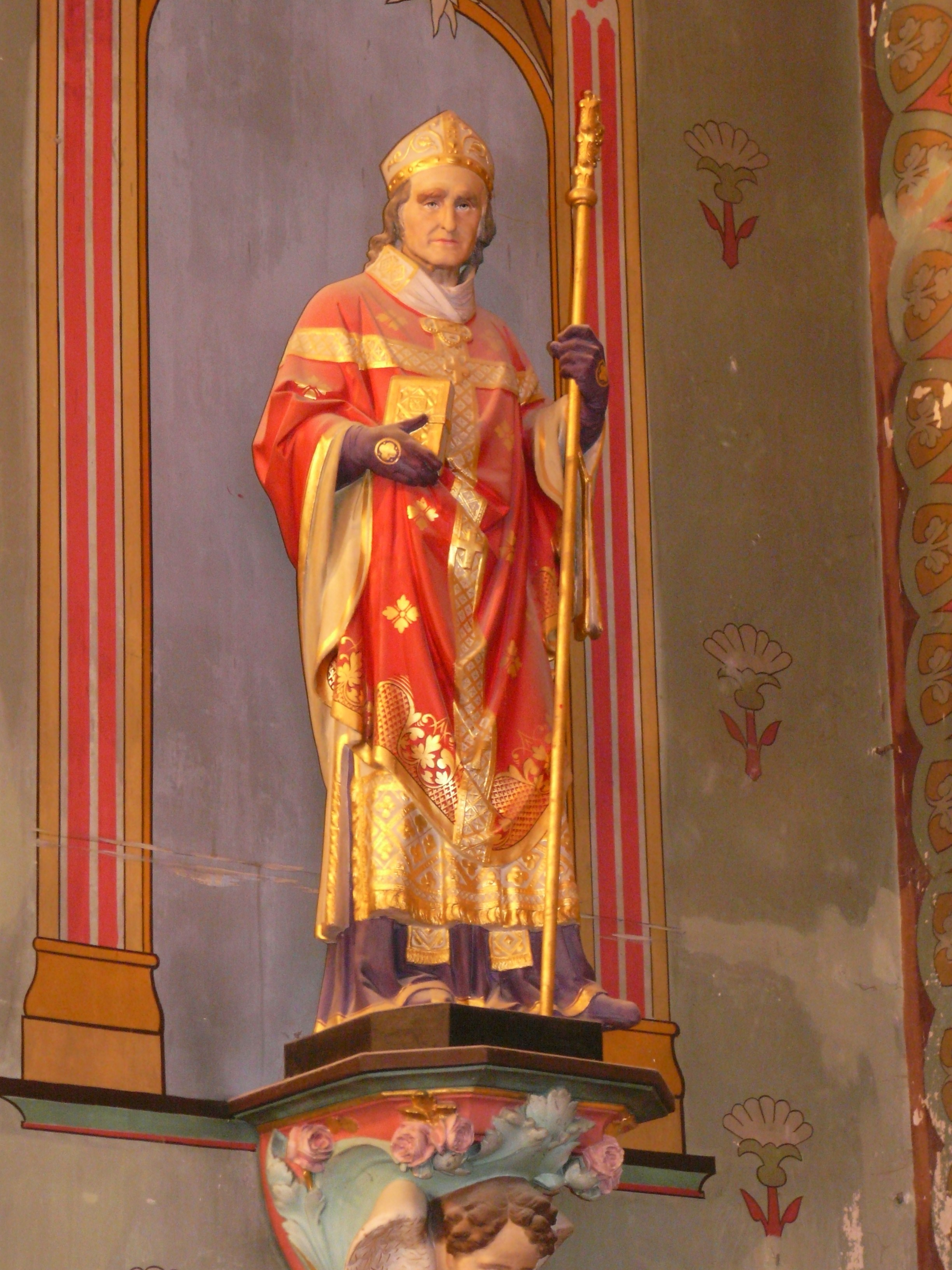 Statue de saint Germain de Paris, église Saint-Germain de Paris, Rouffignac-Saint-Cernin-de-Reilhac, Dordogne, France.